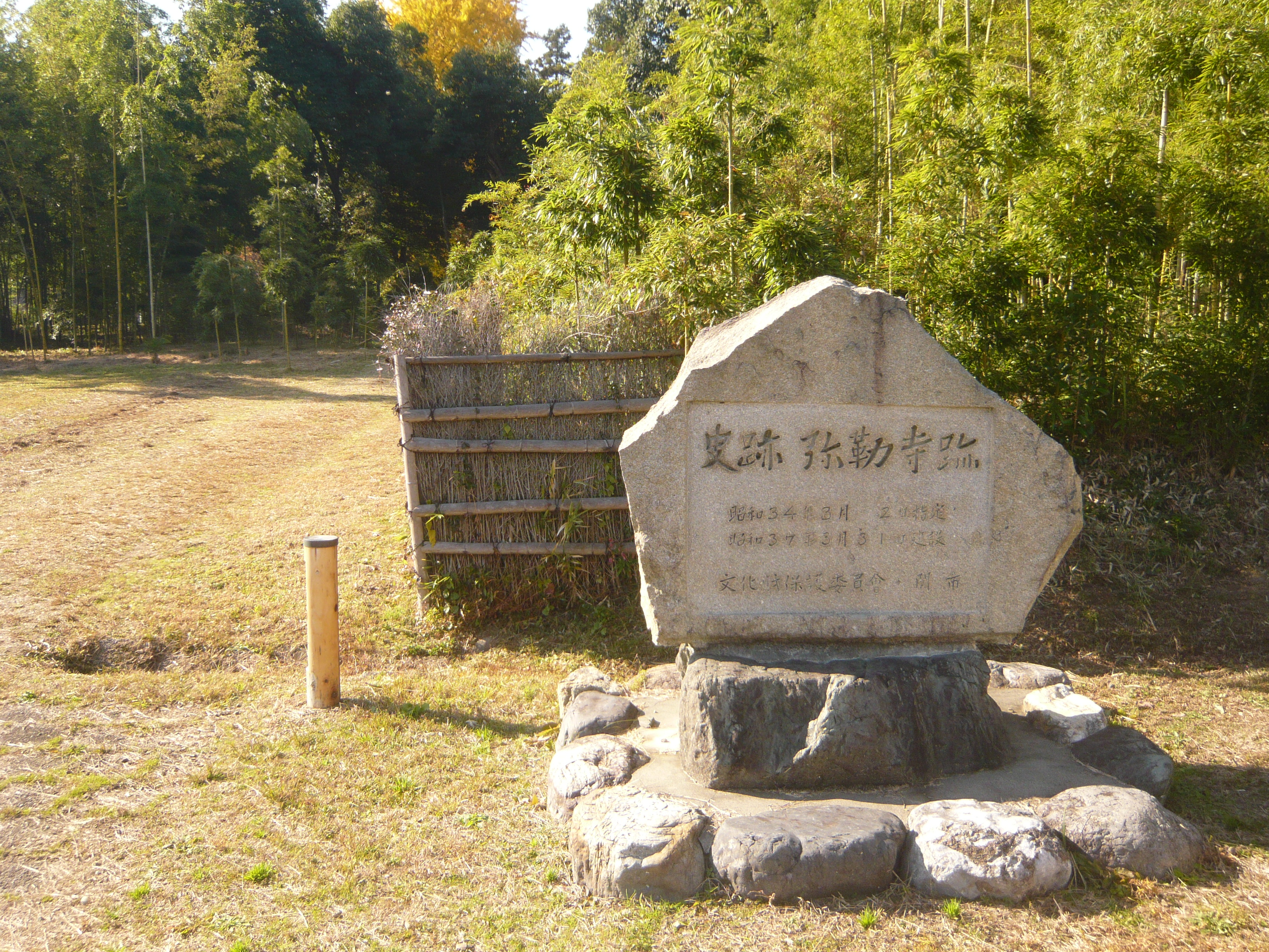 Ruins of Mirokuji Temple 弥勒寺跡（弥勒寺跡 (関市)）,Seki,Gifu,Japan（岐阜県関市）で撮影。